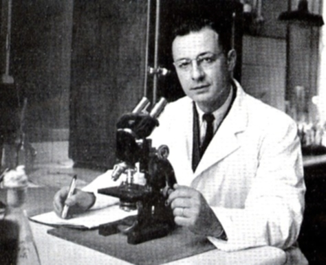 Pierre Saurat, professeur de microbiologie et de maladies contagieuses à l'École nationale vétérinaire de Toulouse, photographie prise en 1953 . Association des anciens élèves et amis de l'École nationale vétérinaire de Toulouse (AEA ENVT).